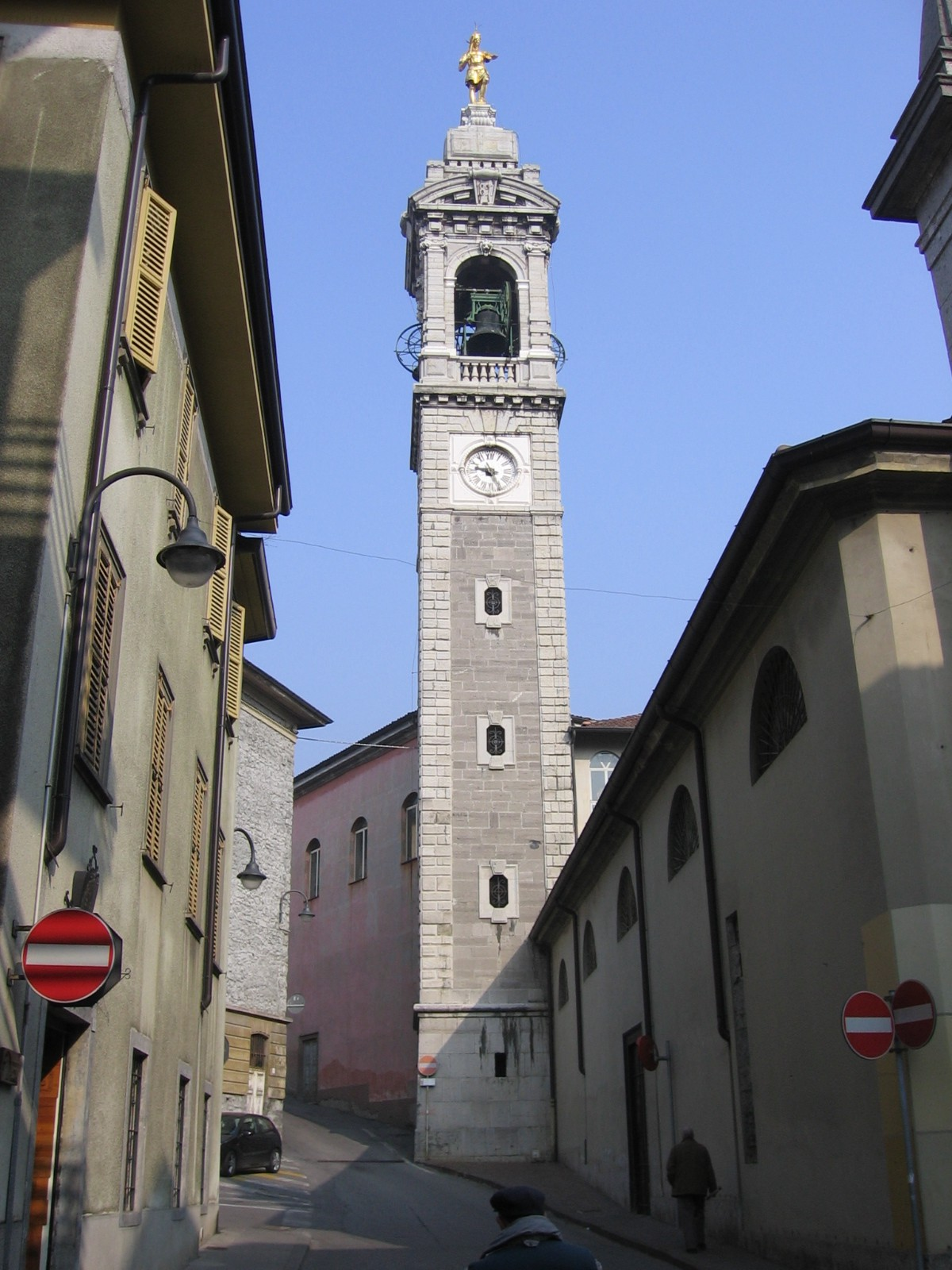 chiesa parrocchiale di sant'Ippolito. Gazzaniga, Bergamo, Italia